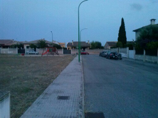 Urbanización Pont d'Inca Parc (Marratxí, Mallorca)